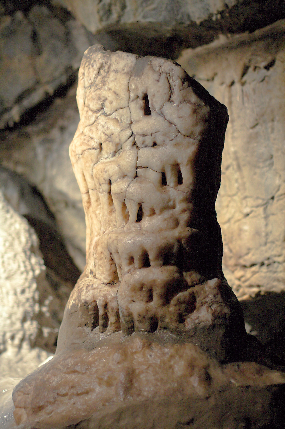 Heinrichshöhle Hemer, „Schiefer Turm von Pisa“